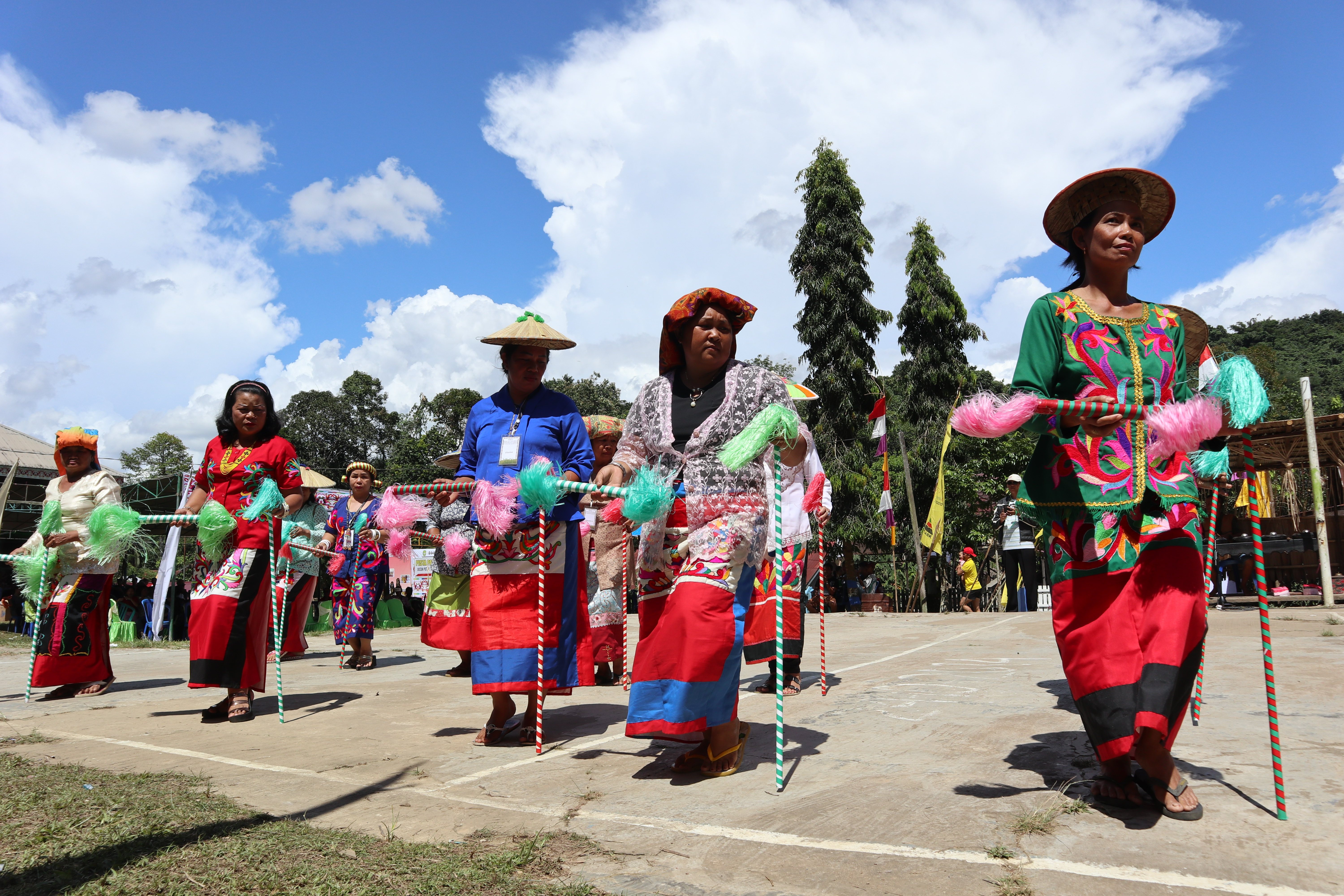 Tari Gantar yang dibawakan oleh etnis Dayak Benuaq.